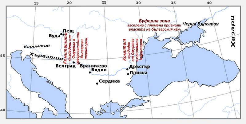 Комитатите създадени според Живко Жеков от кан Омуртаг. Картата използва подложката SoutheasteuropeBlank.jpg. Информацията за разположението на комитатите е взета от книгата: Жеков Ж., България и Византия VII-IX в. - военна администрация, Университетско издателство "Св. Климент Охридски", София, 2007, ISBN 978-954-07-2465-0 Invalid ISBN, карта 11, стр. 389.